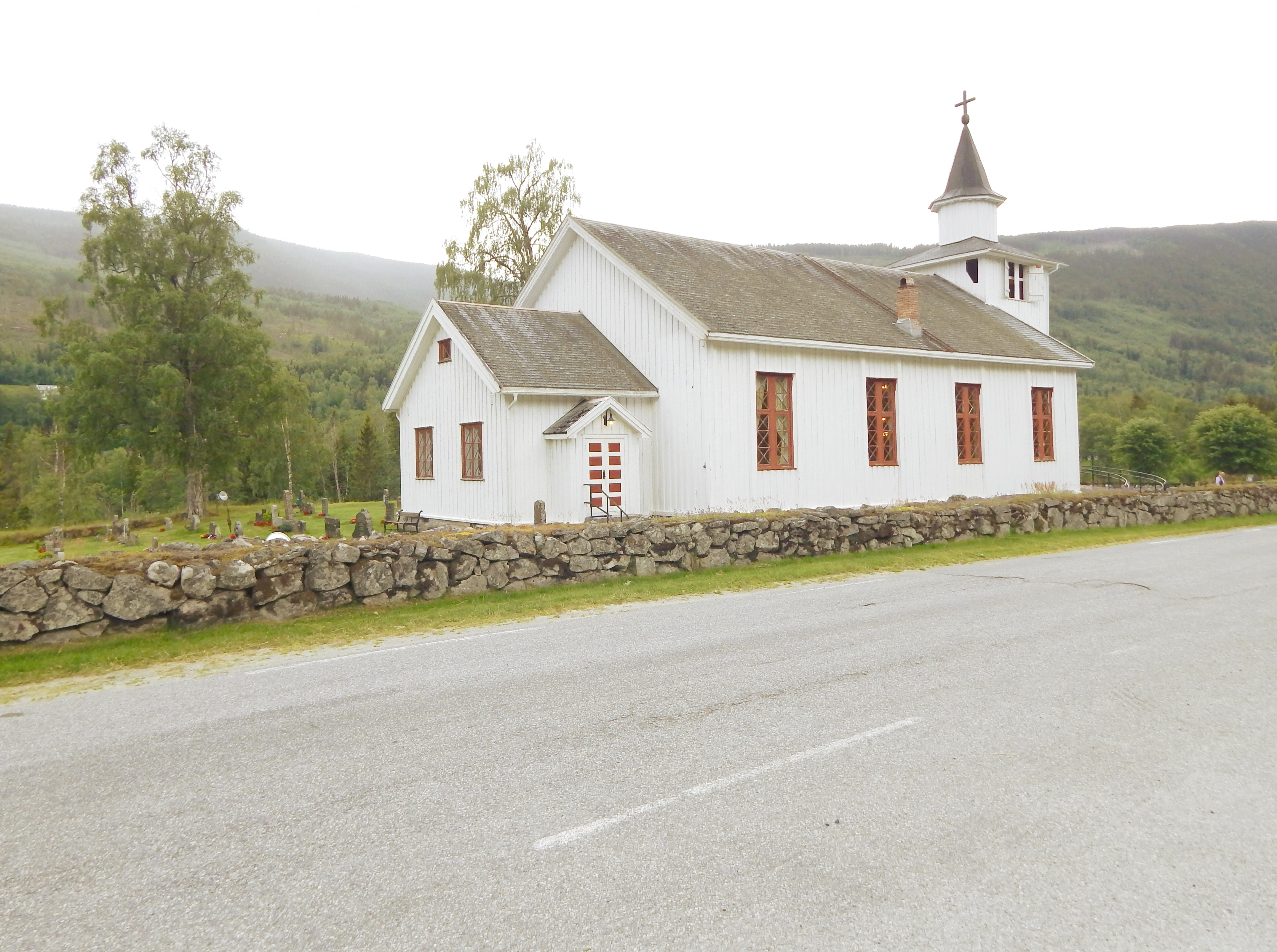 Atrå kirke ved fylkesvei 757 i Telemark